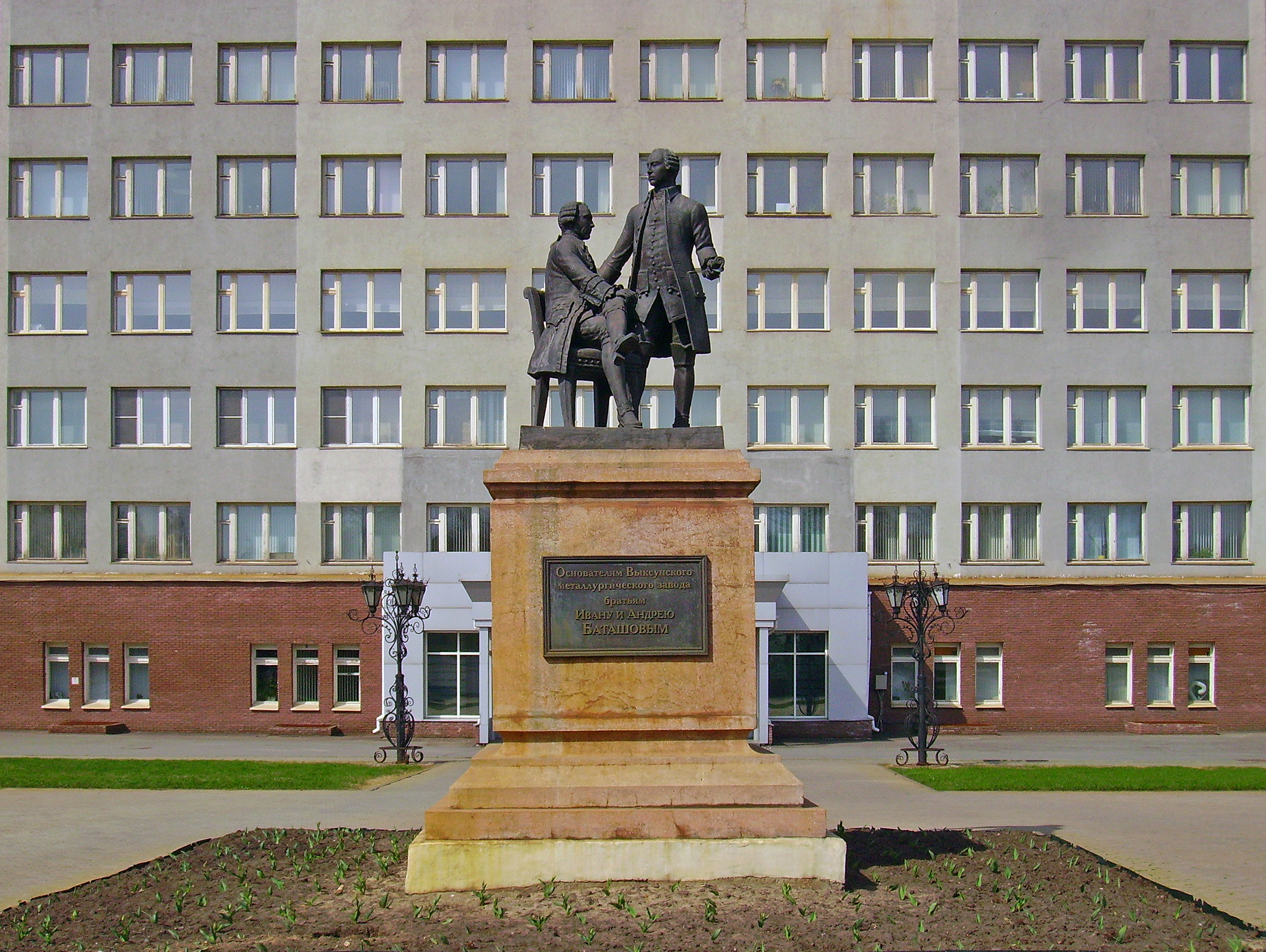 Выкса. Памятник братьям Баташевым